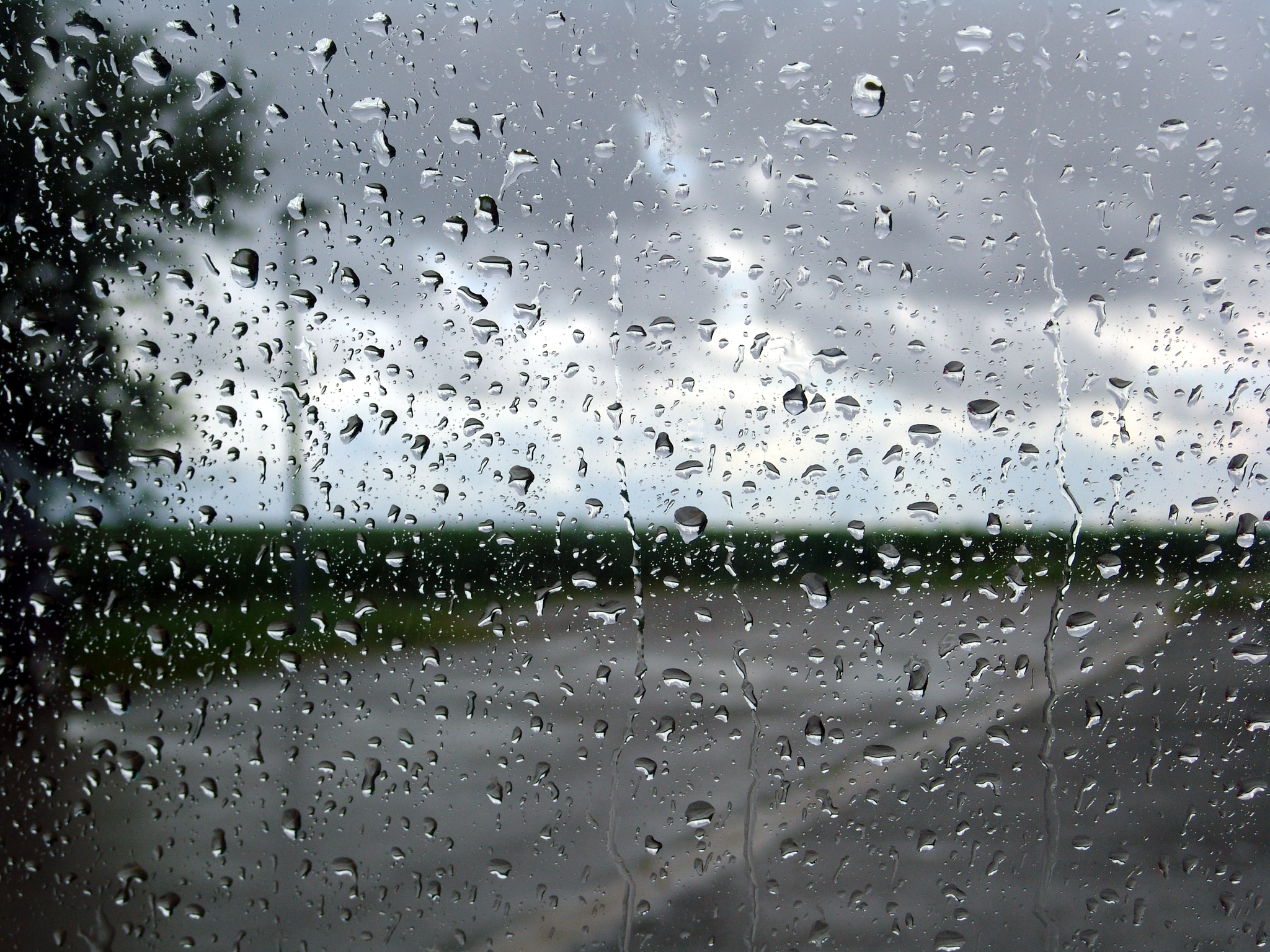 La pluie france 2007